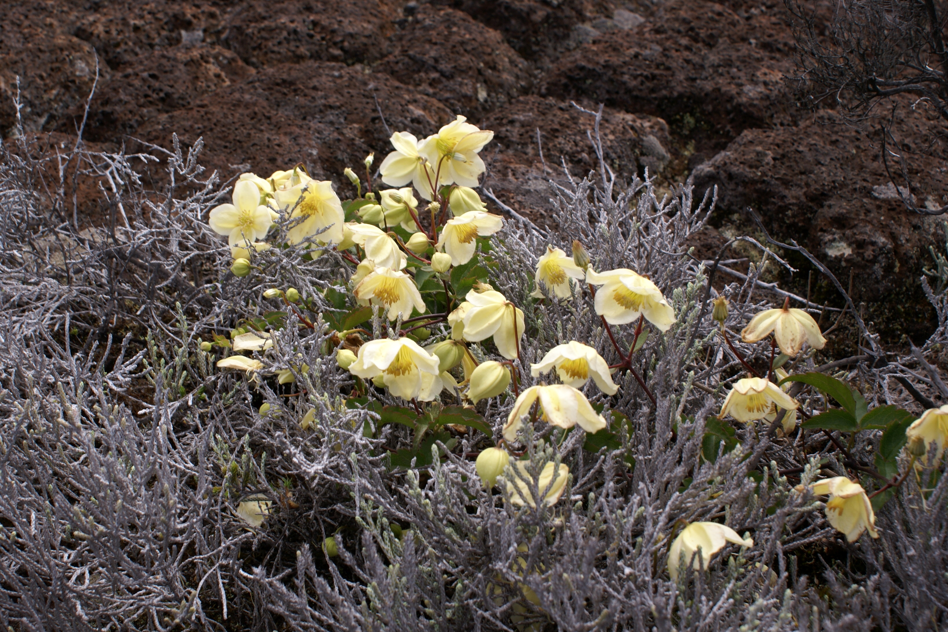 Clematis mauritiana au Pas des Sables (étage oligotherme)